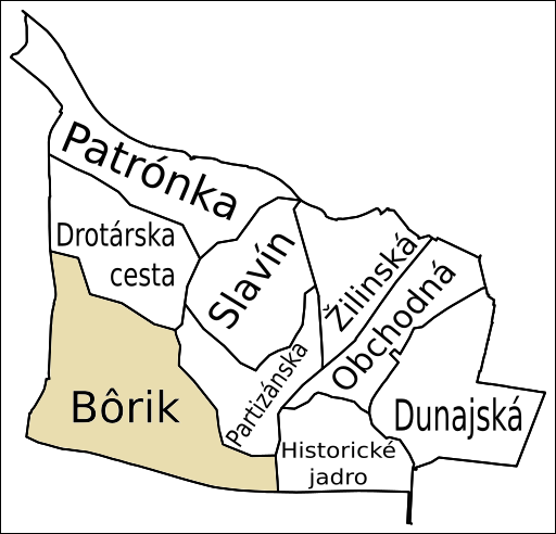 Oblasť Bôrik, Staré Mesto, Bratislava